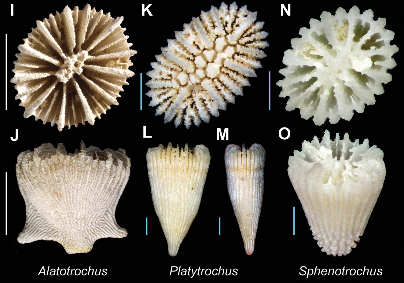 Recorte de imagen partiendo de archivo de Wikimedia commons, para seleccionar géneros de Turbinoliidae